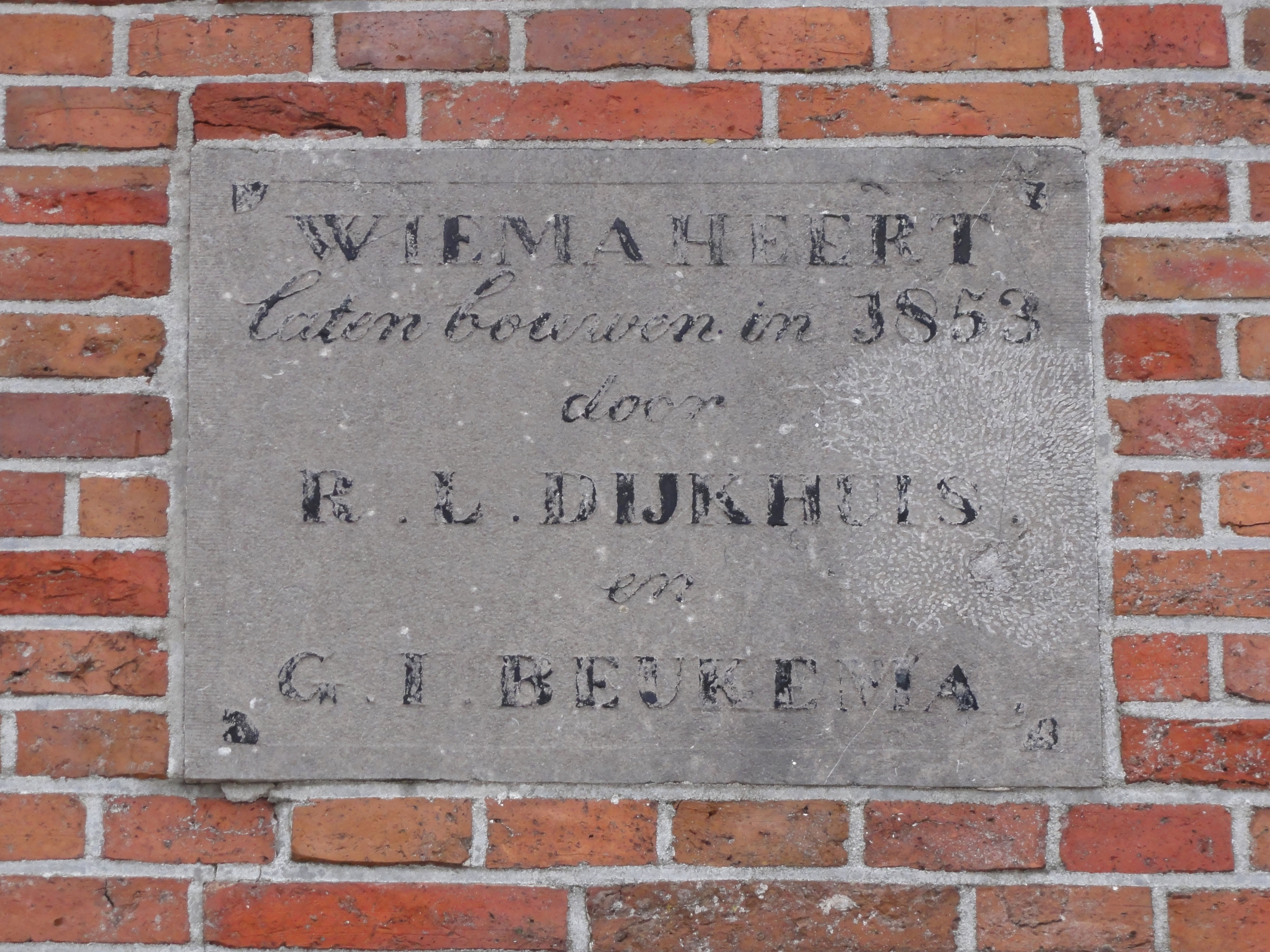 Steen op de Wiemaheert aan de Zoutkamperweg 1 te Niekerk (de Marne)